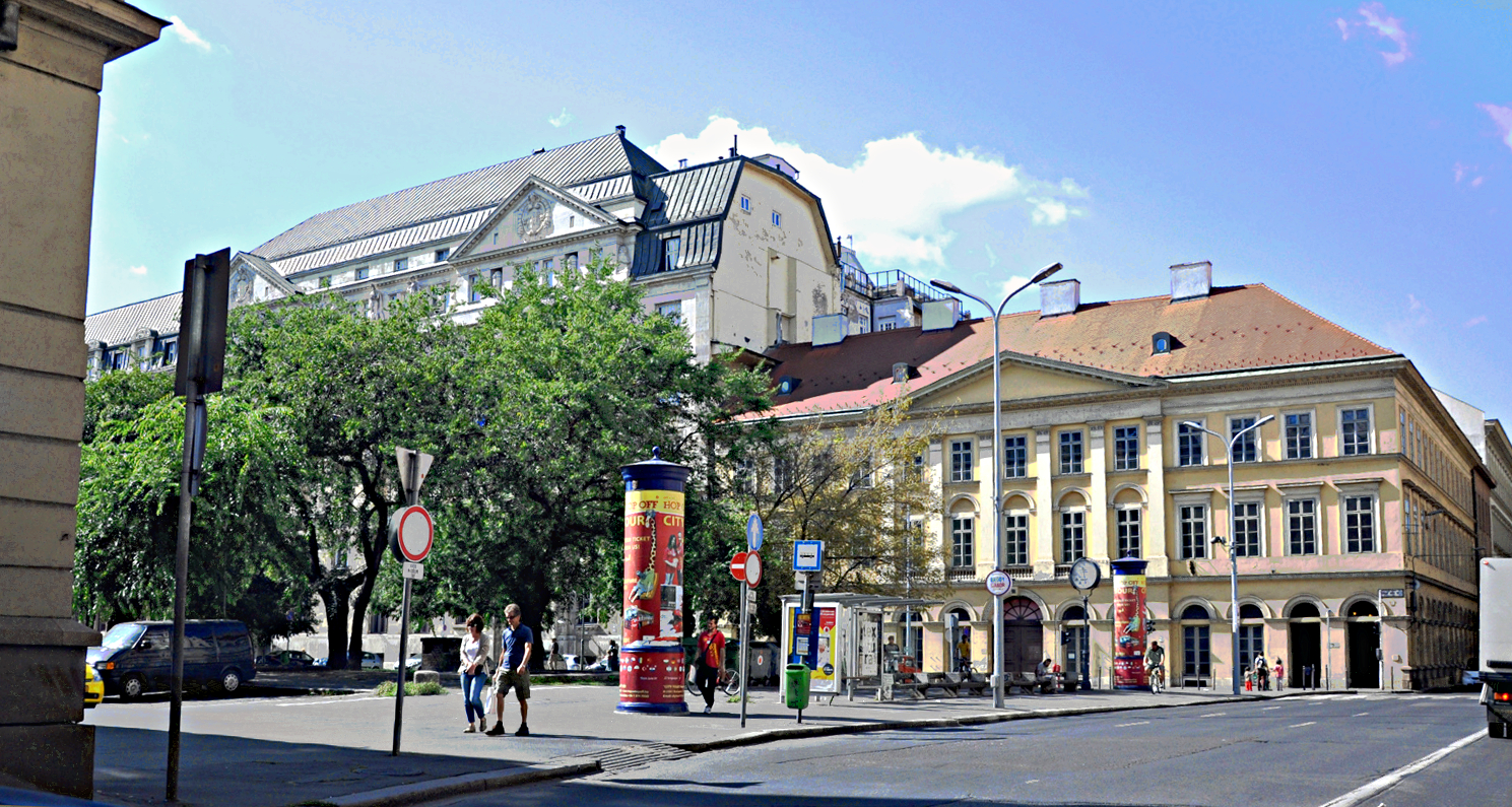 Budapest (100) József Attila út - József Nádor tér